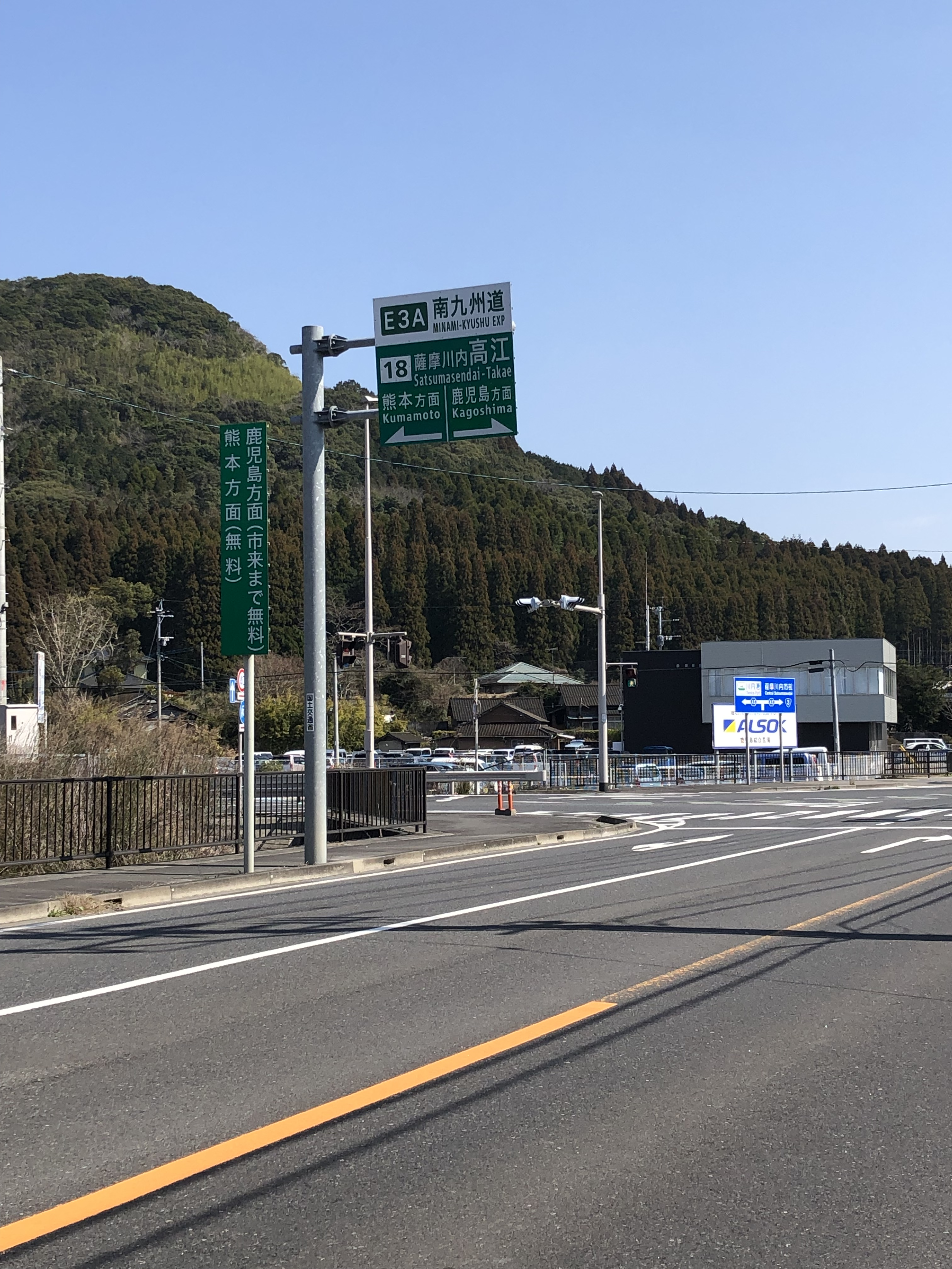 南九州西回り自動車道薩摩川内高江インターチェンジの入り口側標識